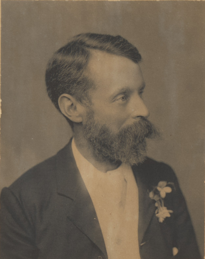 威廉·莫格福德·哈姆勒特